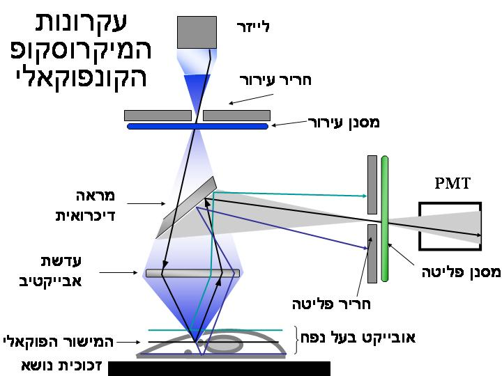 סכמה של מיקרוסקופ קונפוקאלי